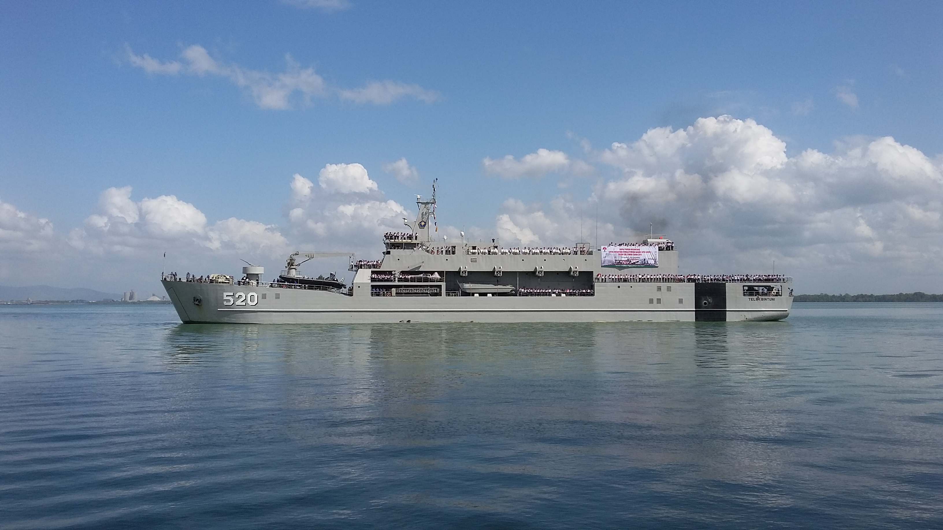 KRI Teluk Bintuni (520) sesaat hendak bersandar di dermaga pelabuhan Kotabaru, Kalimantan Selatan